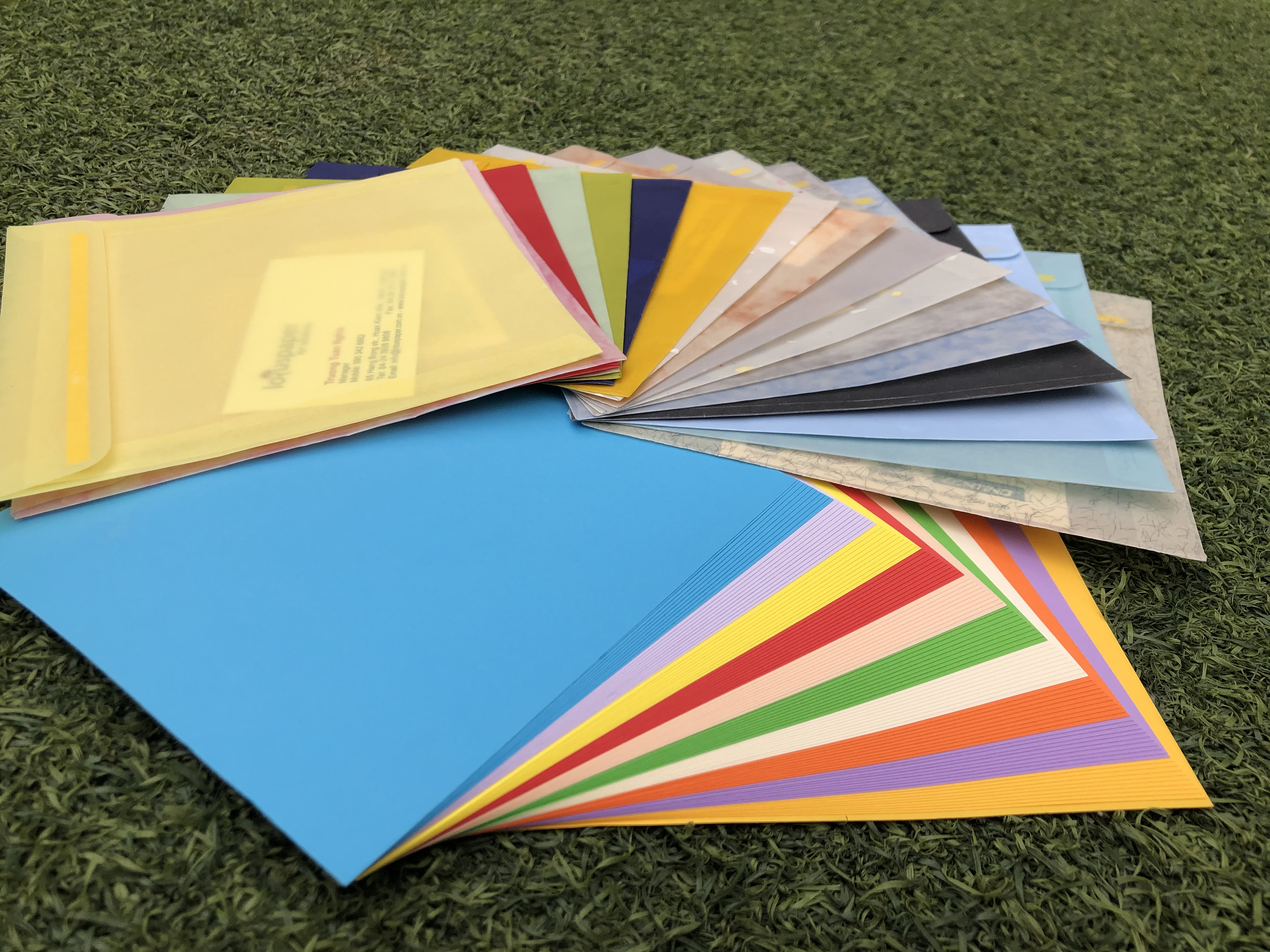 Phong bì giấy can mỹ thuật với băng dính 2 mặt và danh thiếp. Giấy màu hình vuông